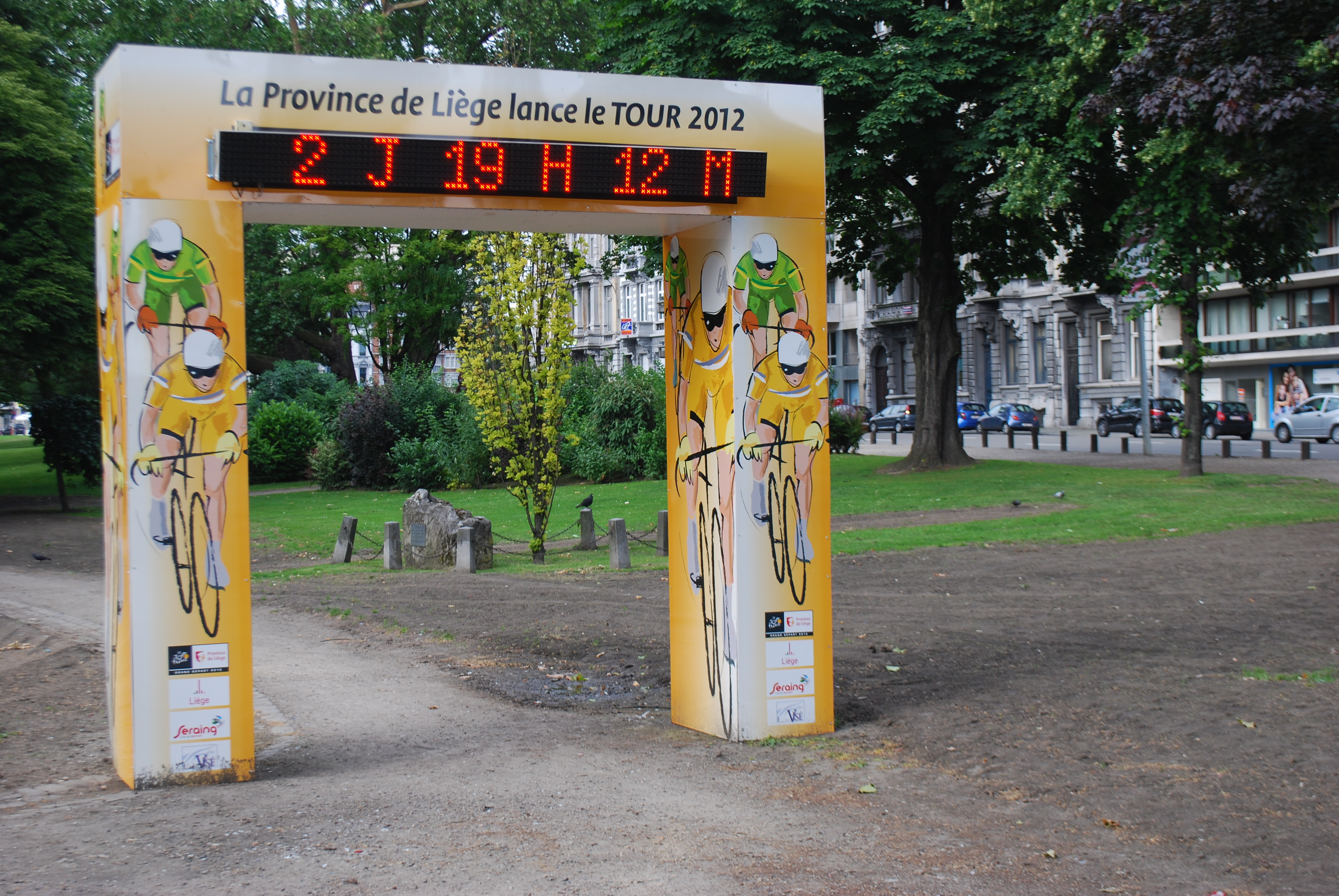 Vue d'un portique promotionnel pour le départ du Tour de France 2012 à Liège.